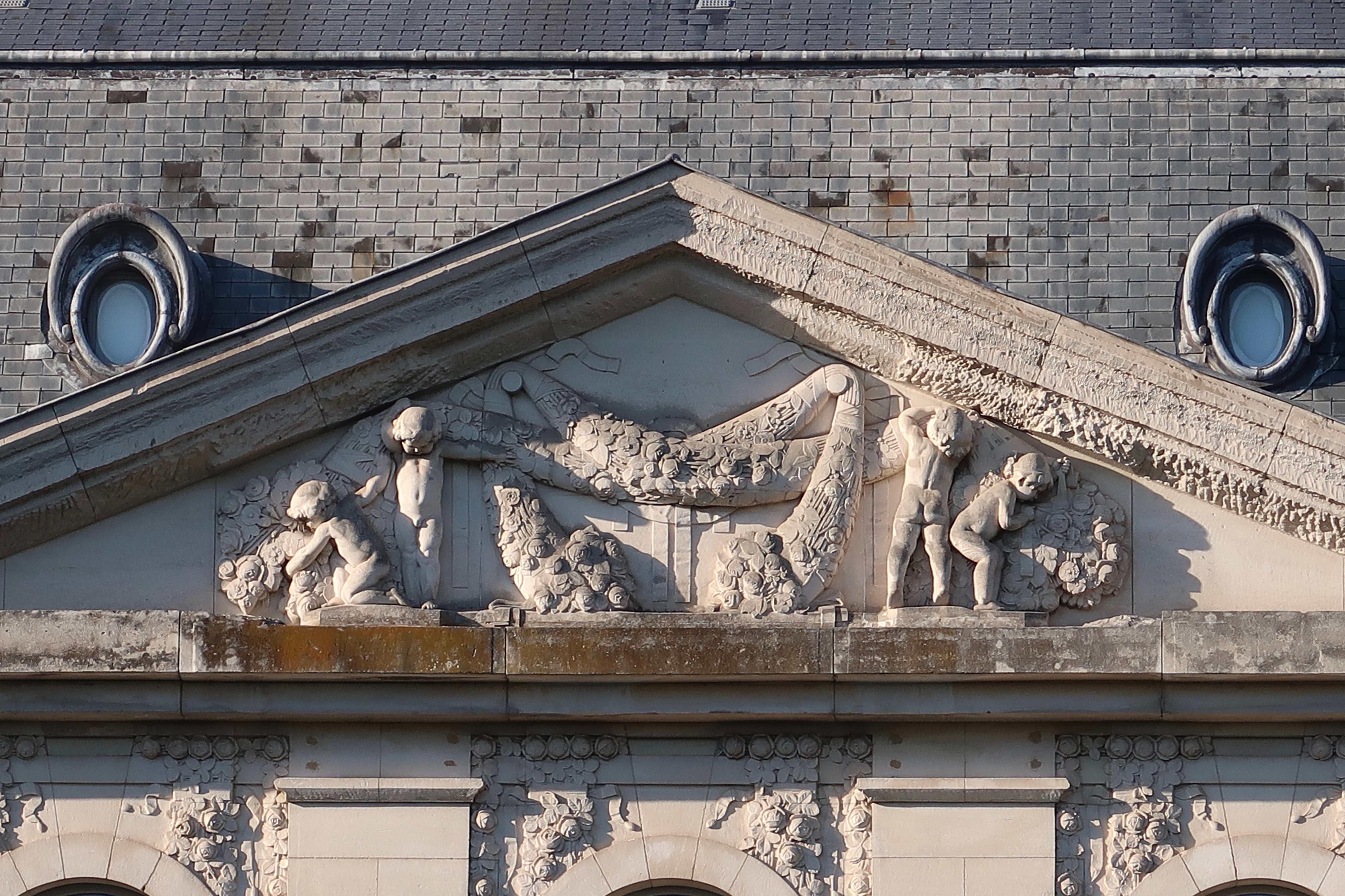 Fronton du château de Longchamp, bâtiment de la fondation GoodPlanet (bois de Boulogne, Paris, 16e).